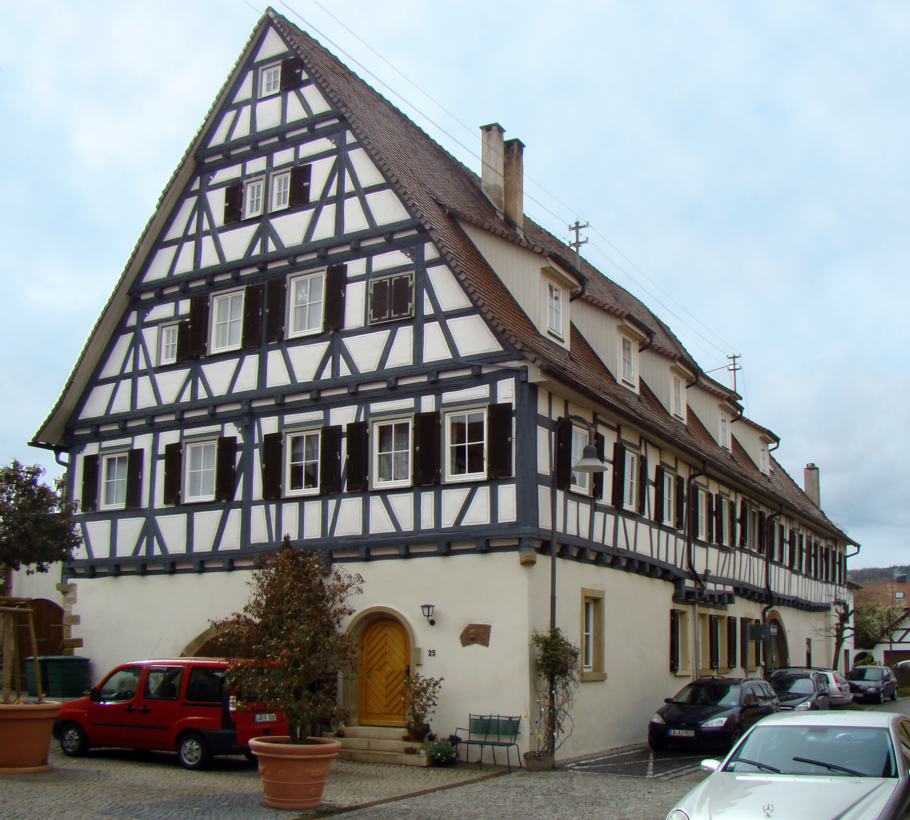 Sogenanntes "Judenschlössle" in Freudental (Lkr. LB)